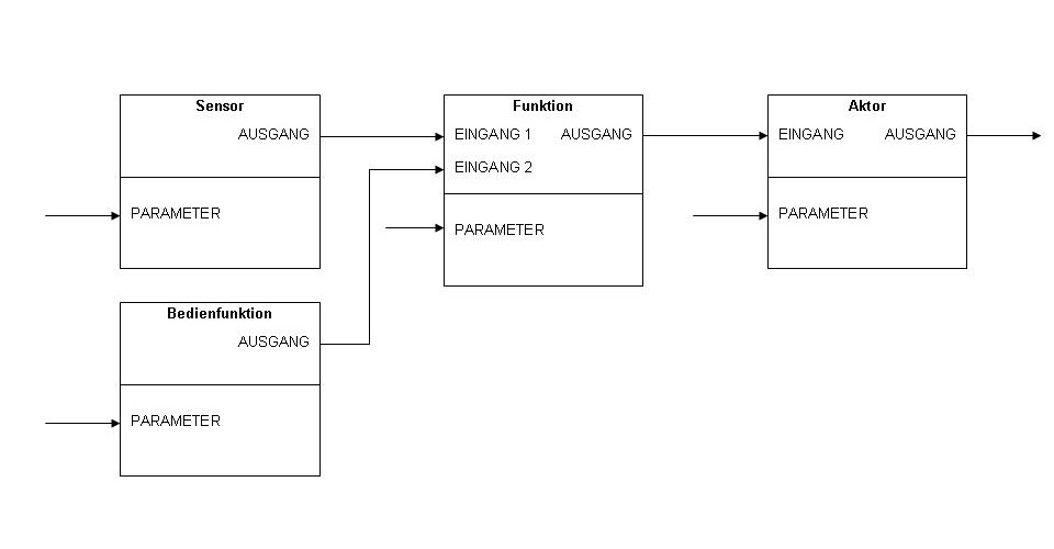 Blockschaltbild einer Raumautomationsfunktion